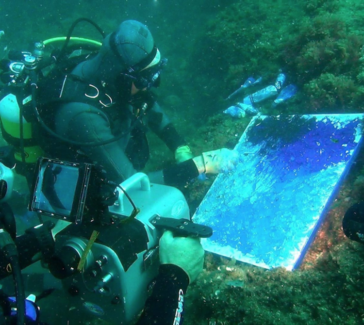 André Laban sous les caméras du 20 heures de TF1 réalise une toile sous-marine à Carry le Rouet en septembre 2014 à l'initiative de Maecene Arts